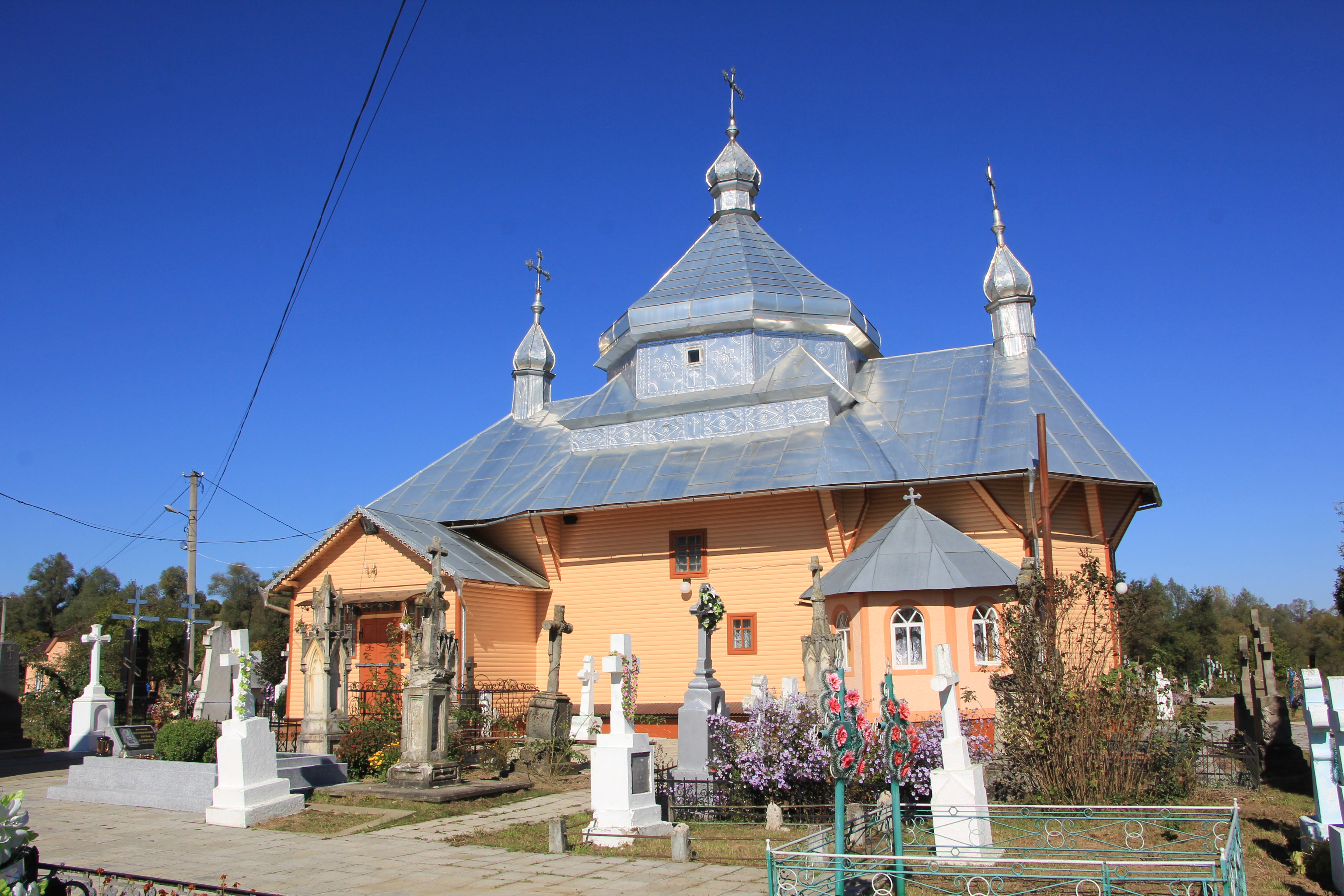 Дерев'яна церква Св. Арх. Михайла 1806р. с. Стара Жадова